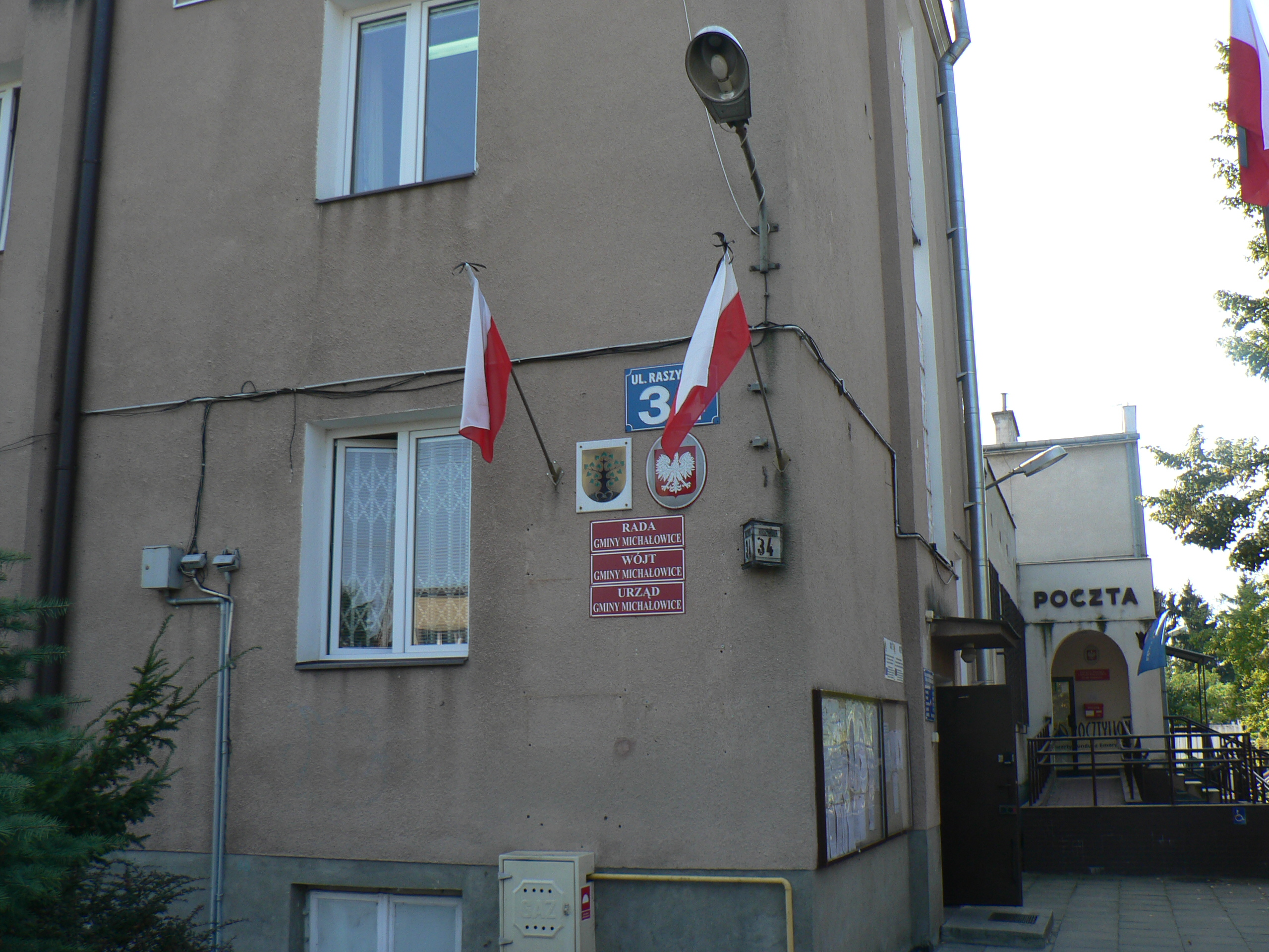 Urząd gminy Michałowice i poczta